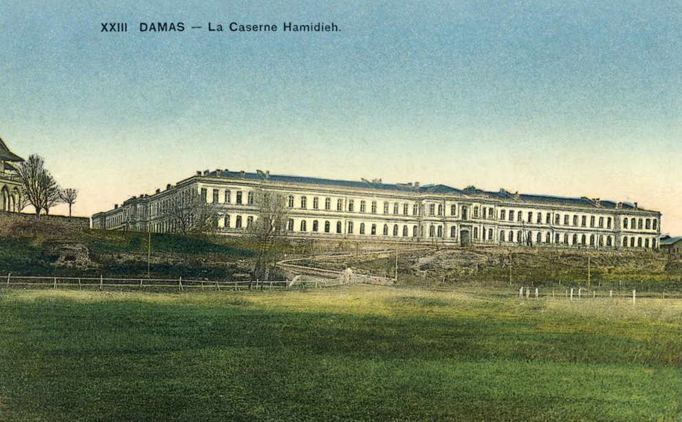 القشلة الحمدية سابقاً - بناء الجامعة السورية سابقاً - بناء كلية الحقوق والعلوم حالياً